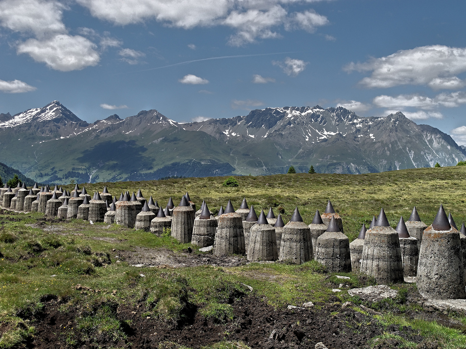 Sbarramento Pian dei Morti